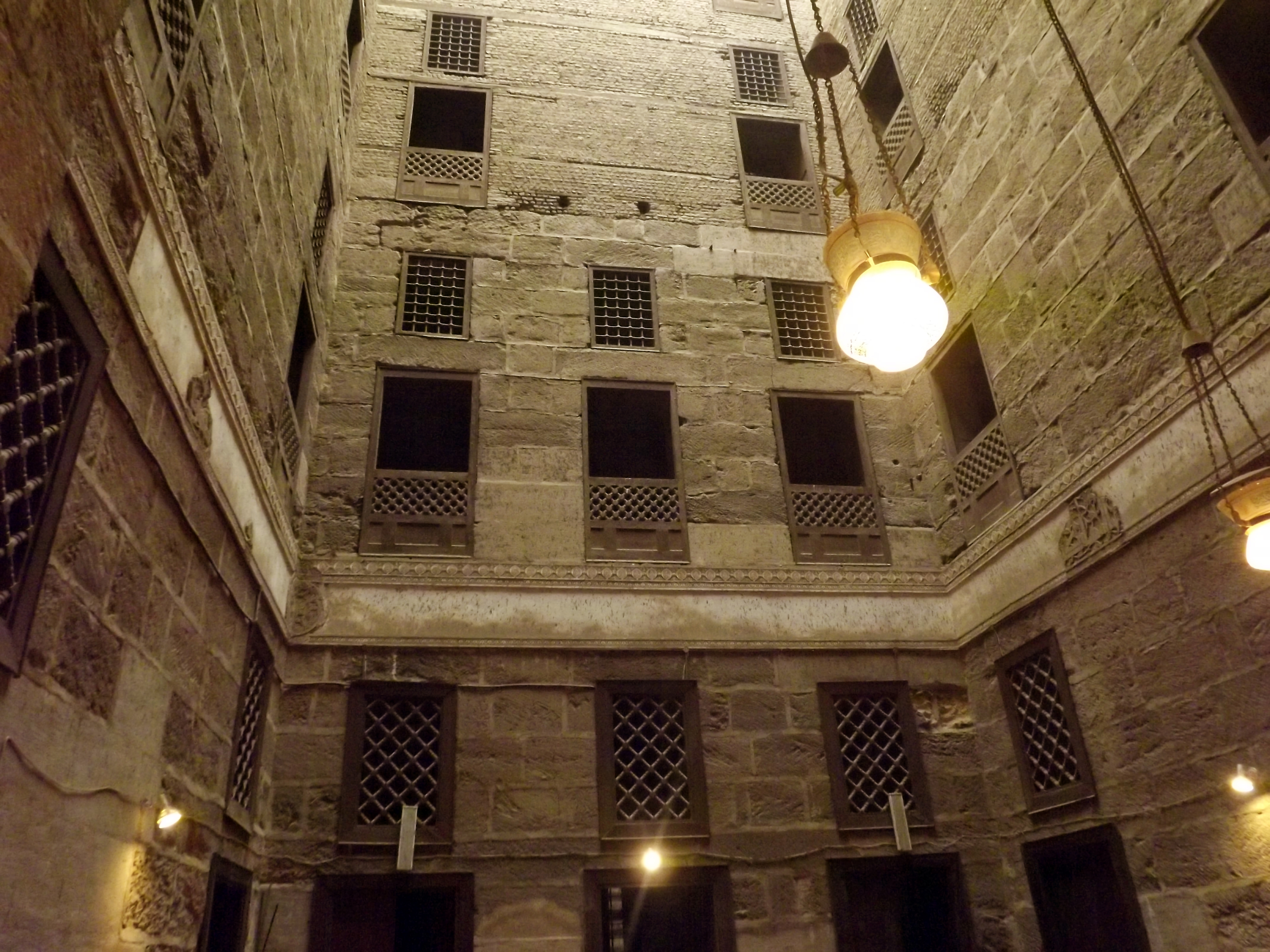 داخل مسجد السلطان حسن